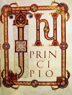 Zweite Bibel Karls des Kahlen (Paris, Bibliothèque nationale, Lat. 2); Initiale zur Genesis (11r)